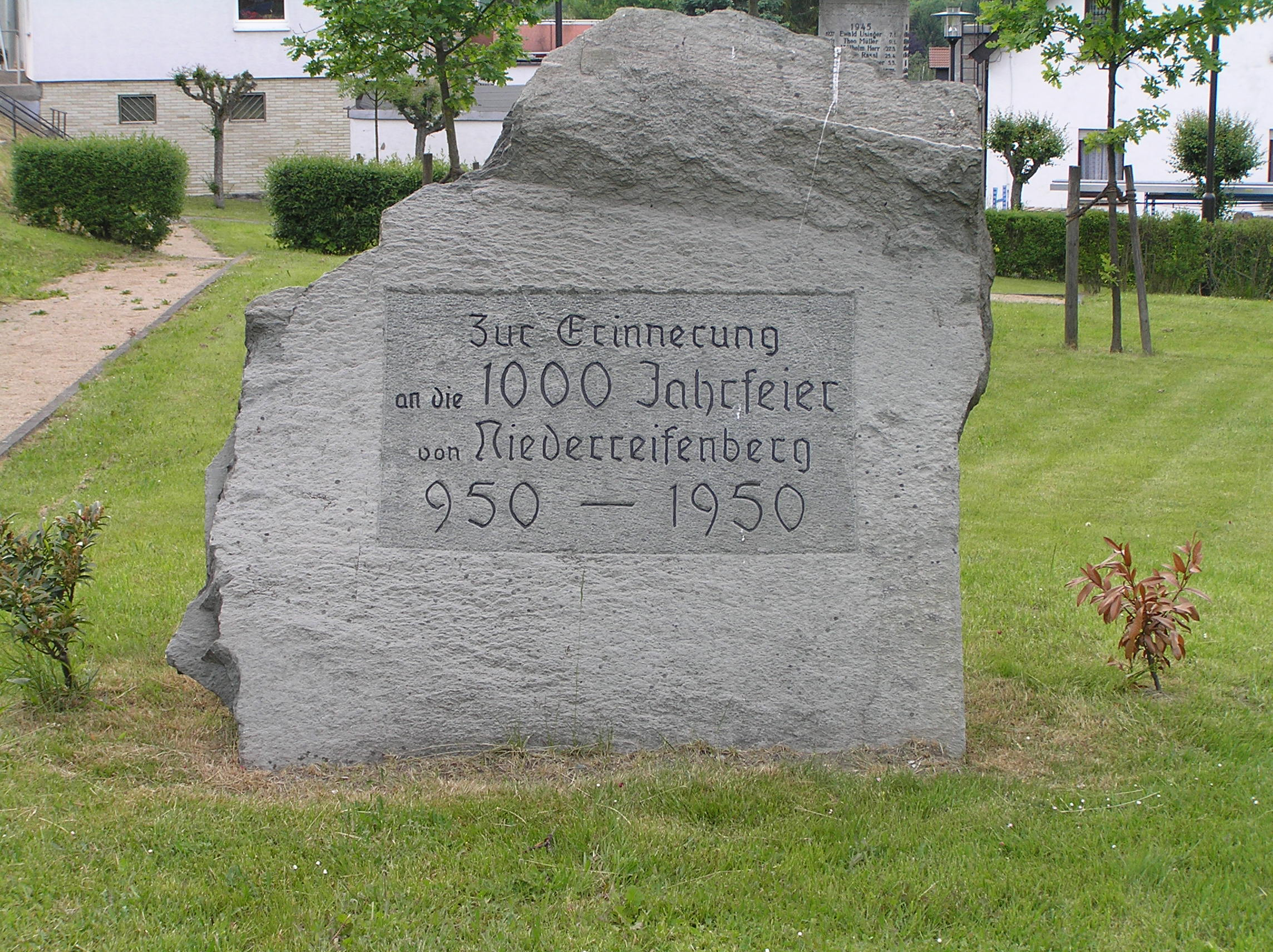 Niederreifenberg, Schmitten, Deutschland: Gedenkstein zur Tausend-Jahr-Feier des Ortes beim Kriegerdenkmal, errichtet 1950